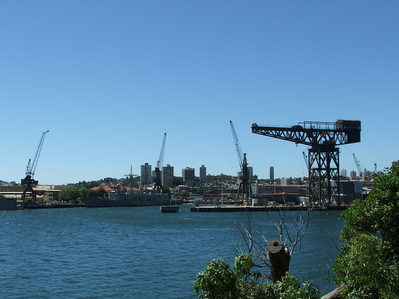 Dock in Sydney - dok v Sydney